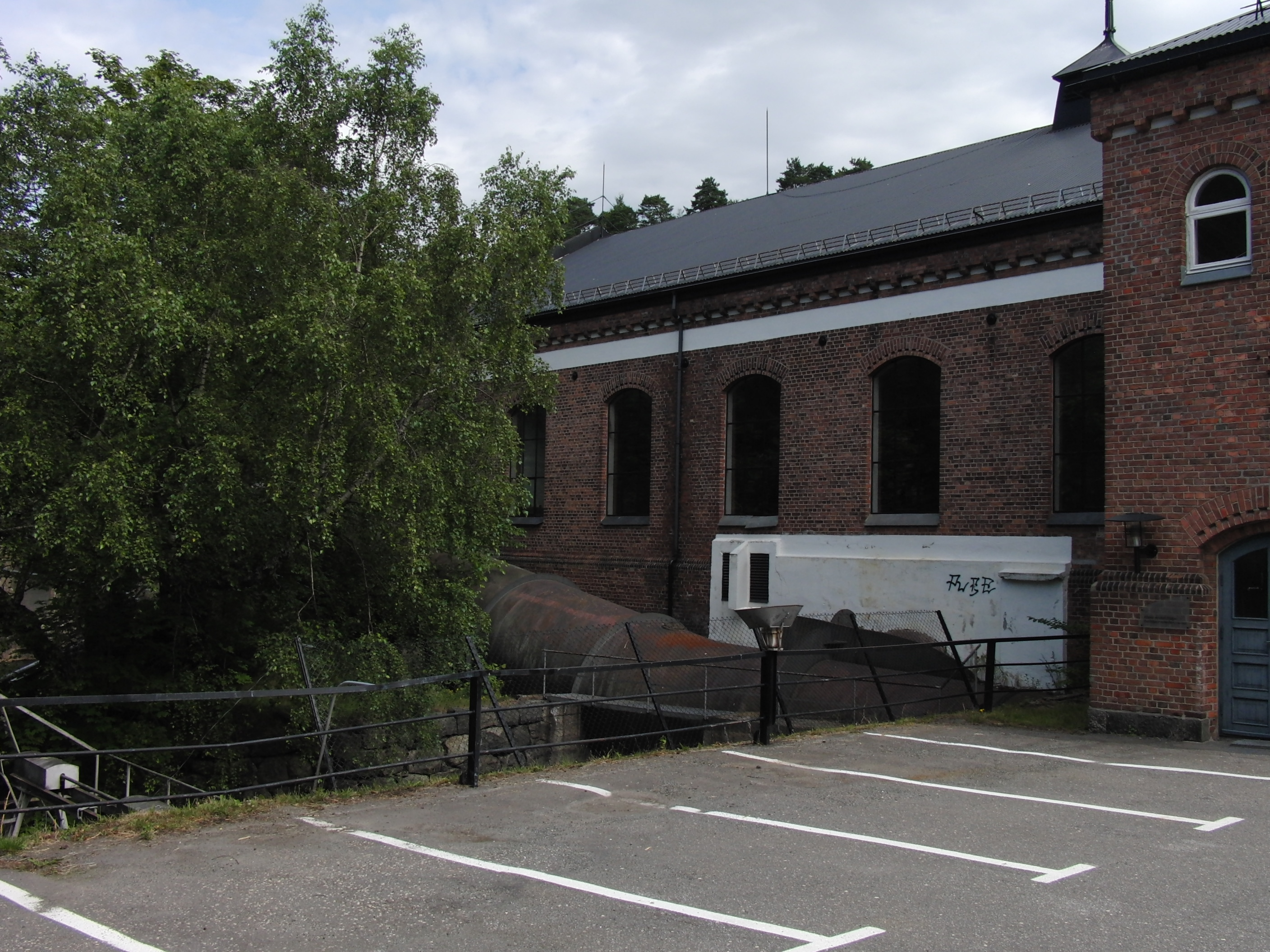 Fritzøe kraftverk bygg "A"